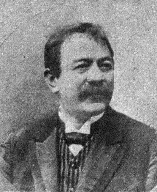 Österreichischer Politiker, Reichsratswahl 1907, Name siehe Dateiname